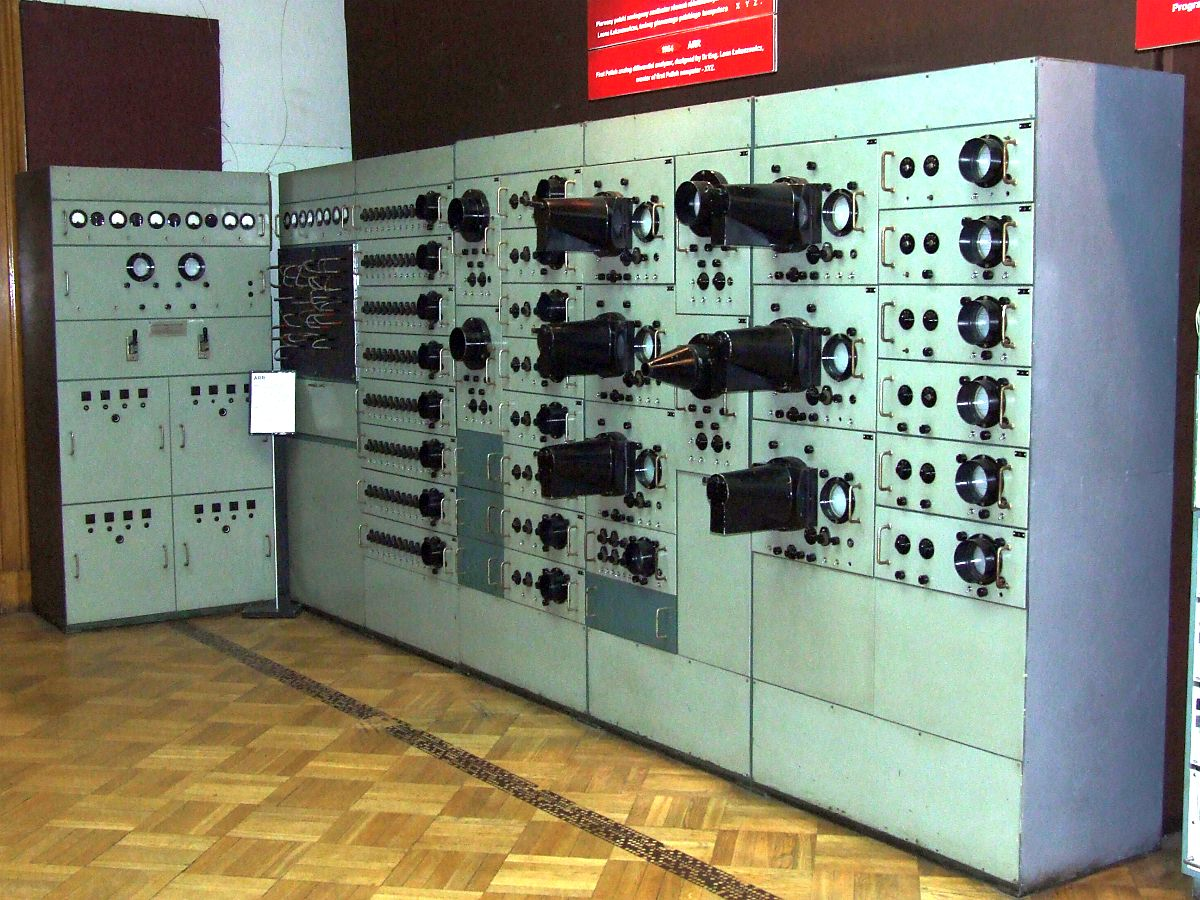 ARR, Muzeum Techniki, Warszawa